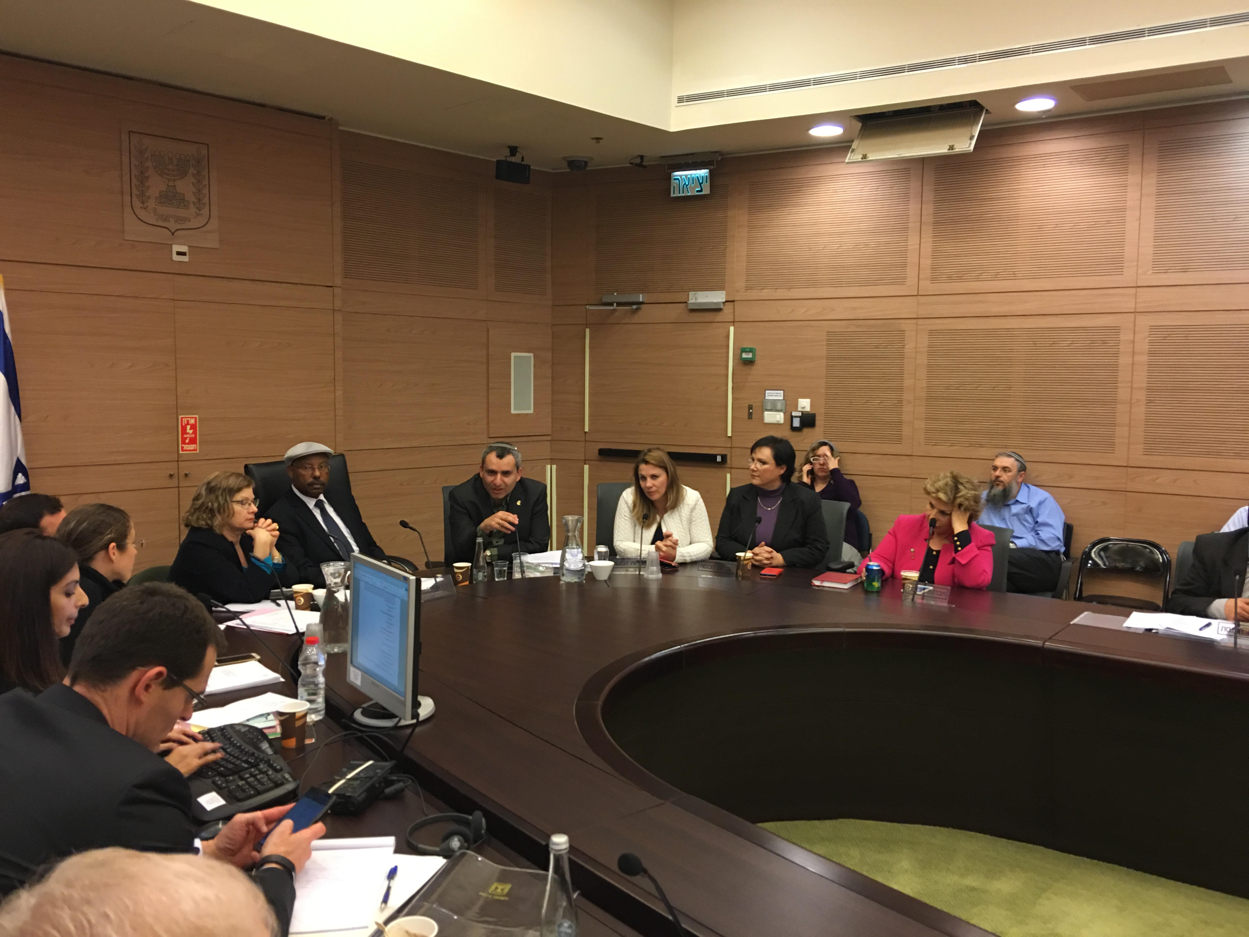 בועדת העלייה והקליטה